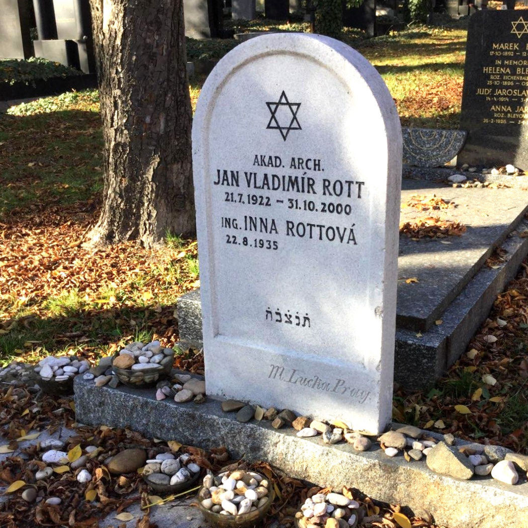 Hrob Jana, již s jménem Inny, Praha 2015 / Nový židovský hřbitov, Praha